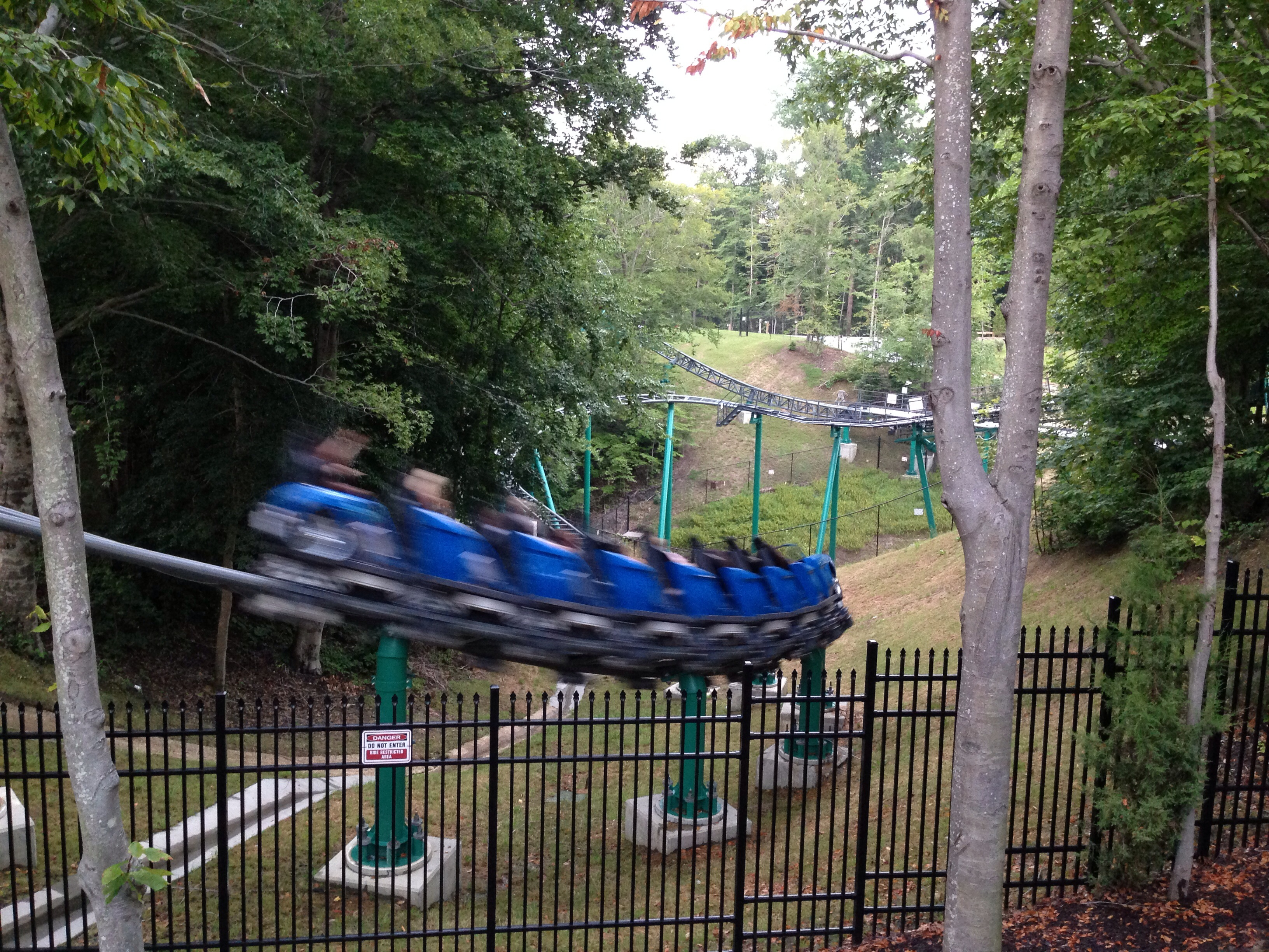 Verbolten Rollercoaster